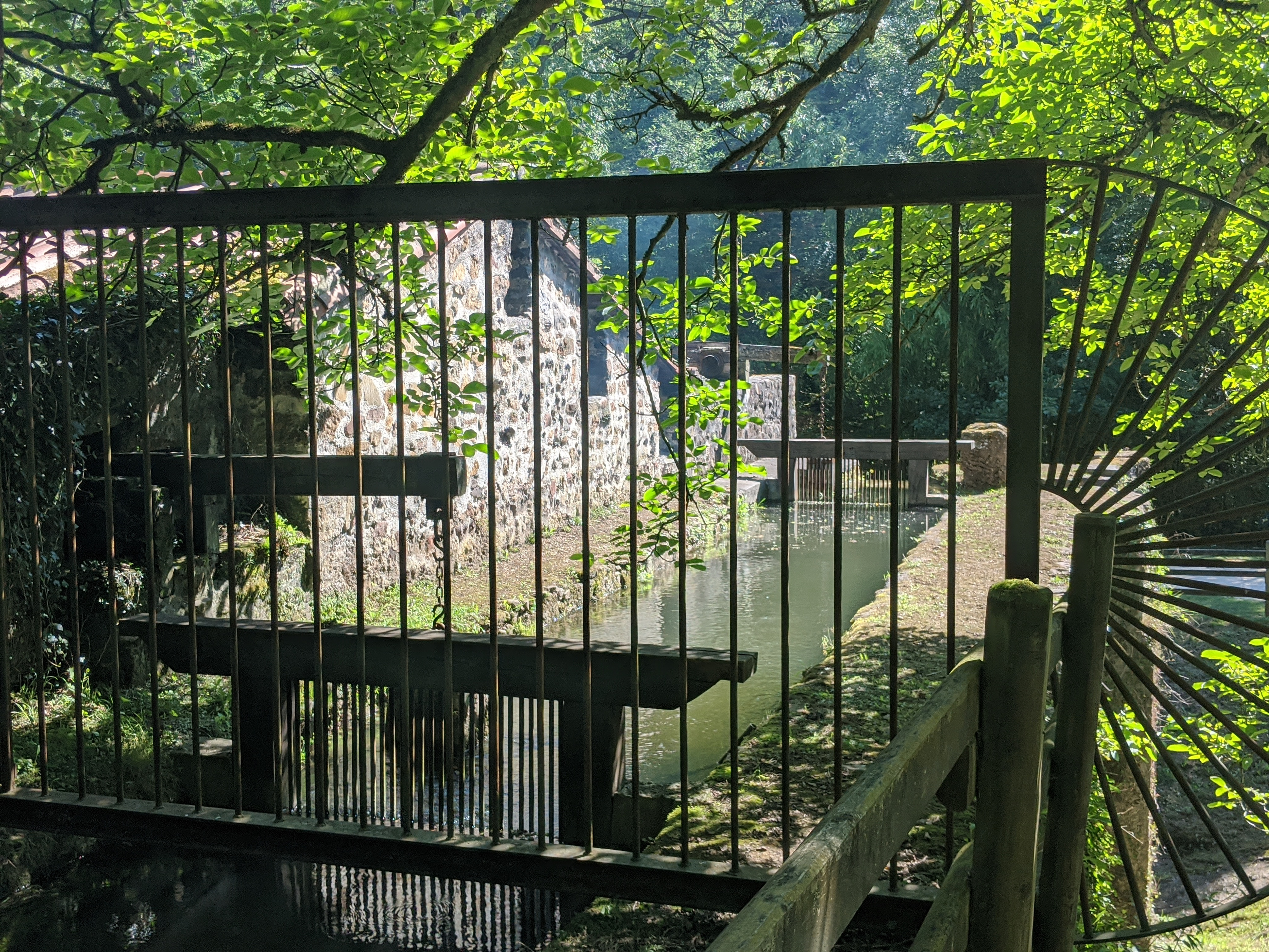 El Pobaleko burdinola Muskizko El Pobal auzoan dagoen burdinola da. Salazartarrek XVI. mendean eraiki zuten.